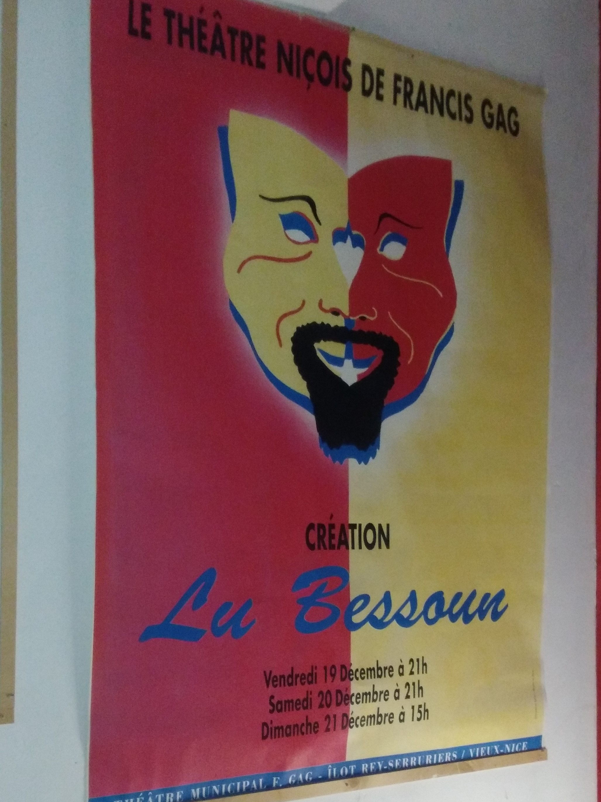 Affiche originale de la pièce "Lu Bessoun" de Pierre Louis Gag